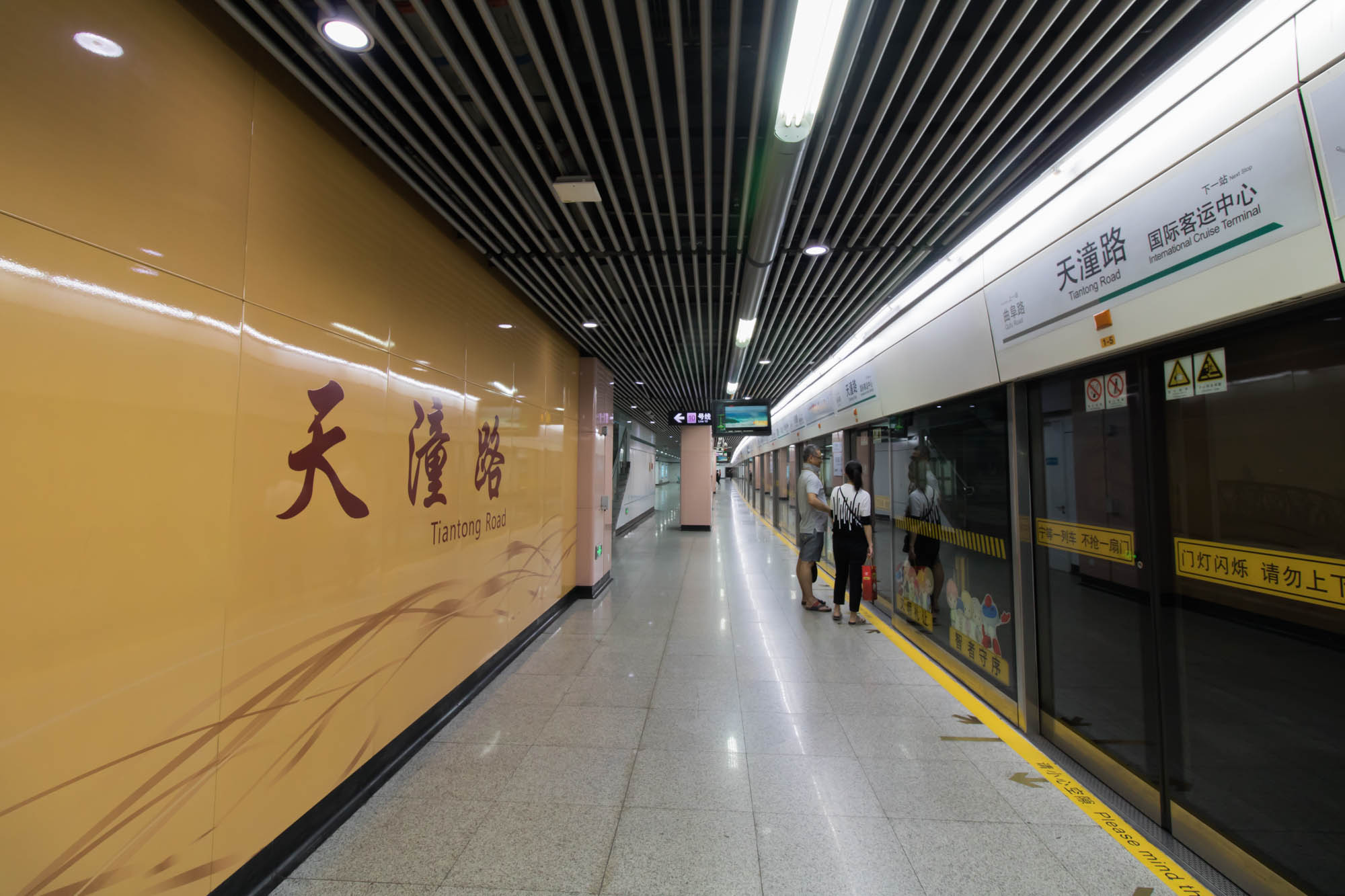 中文（中国大陆）: 上海地铁12号线天潼路站